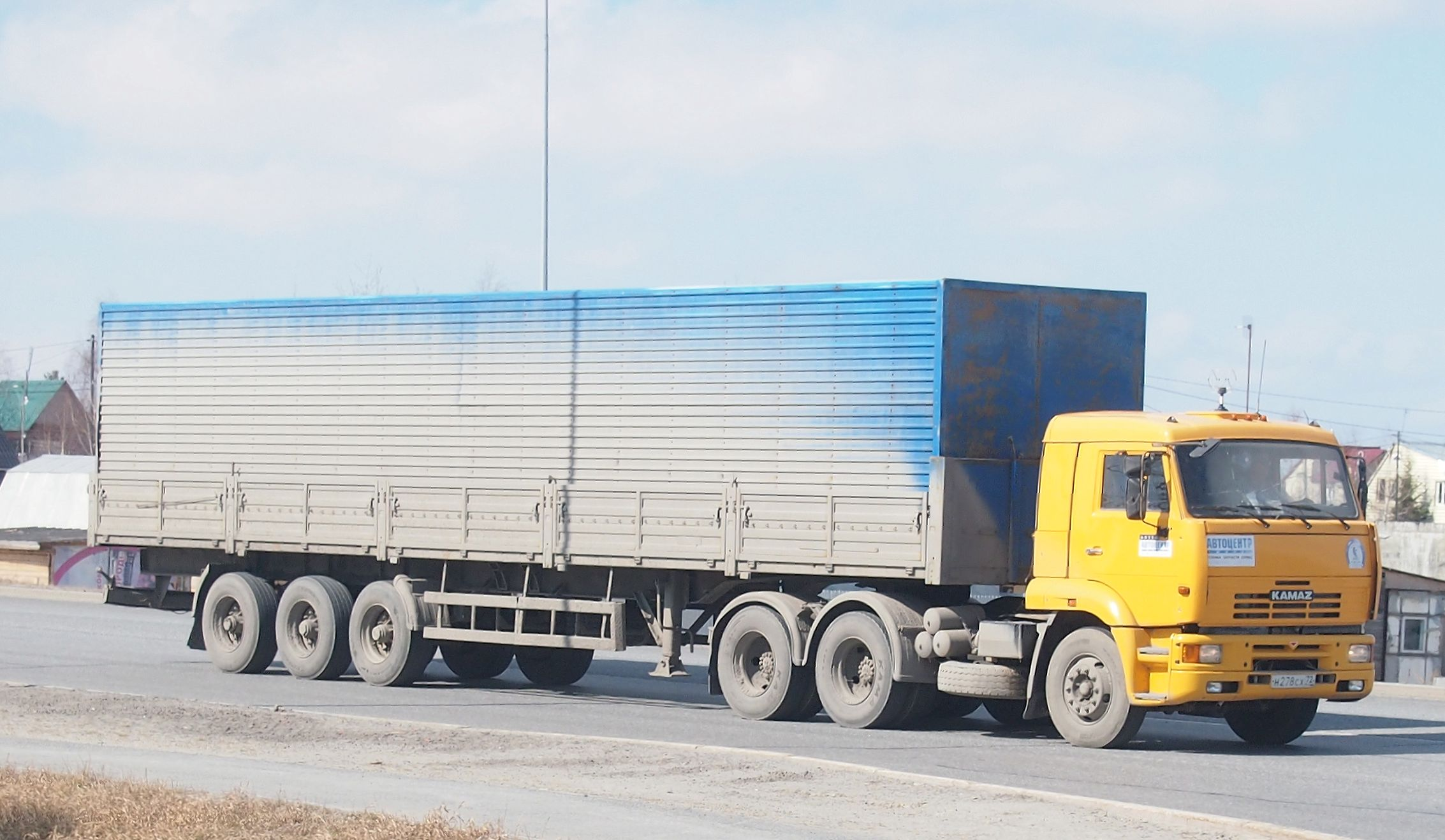 КАМАЗ-65116, Ханты-Мансийск